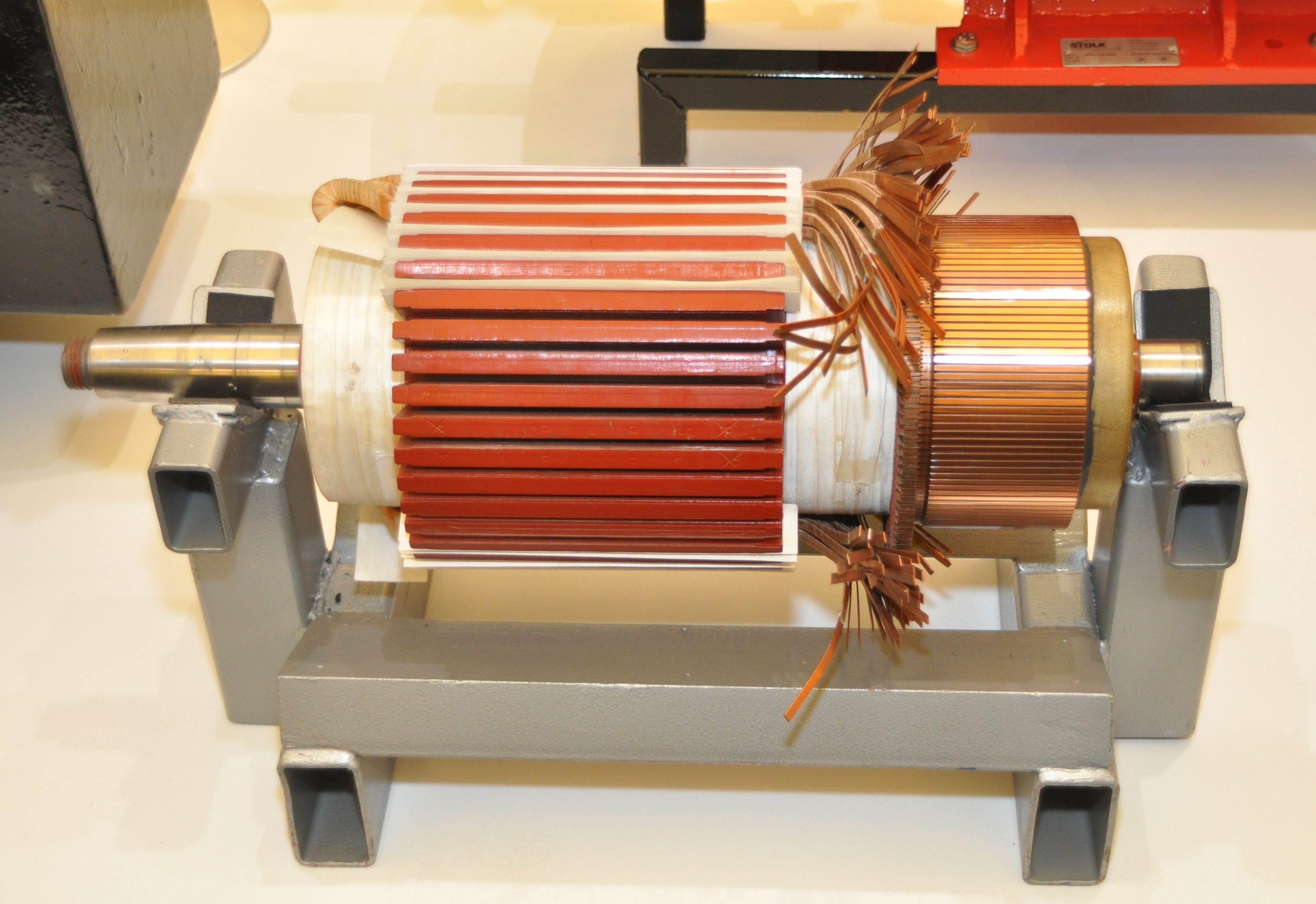 Equipment for the shipping industry